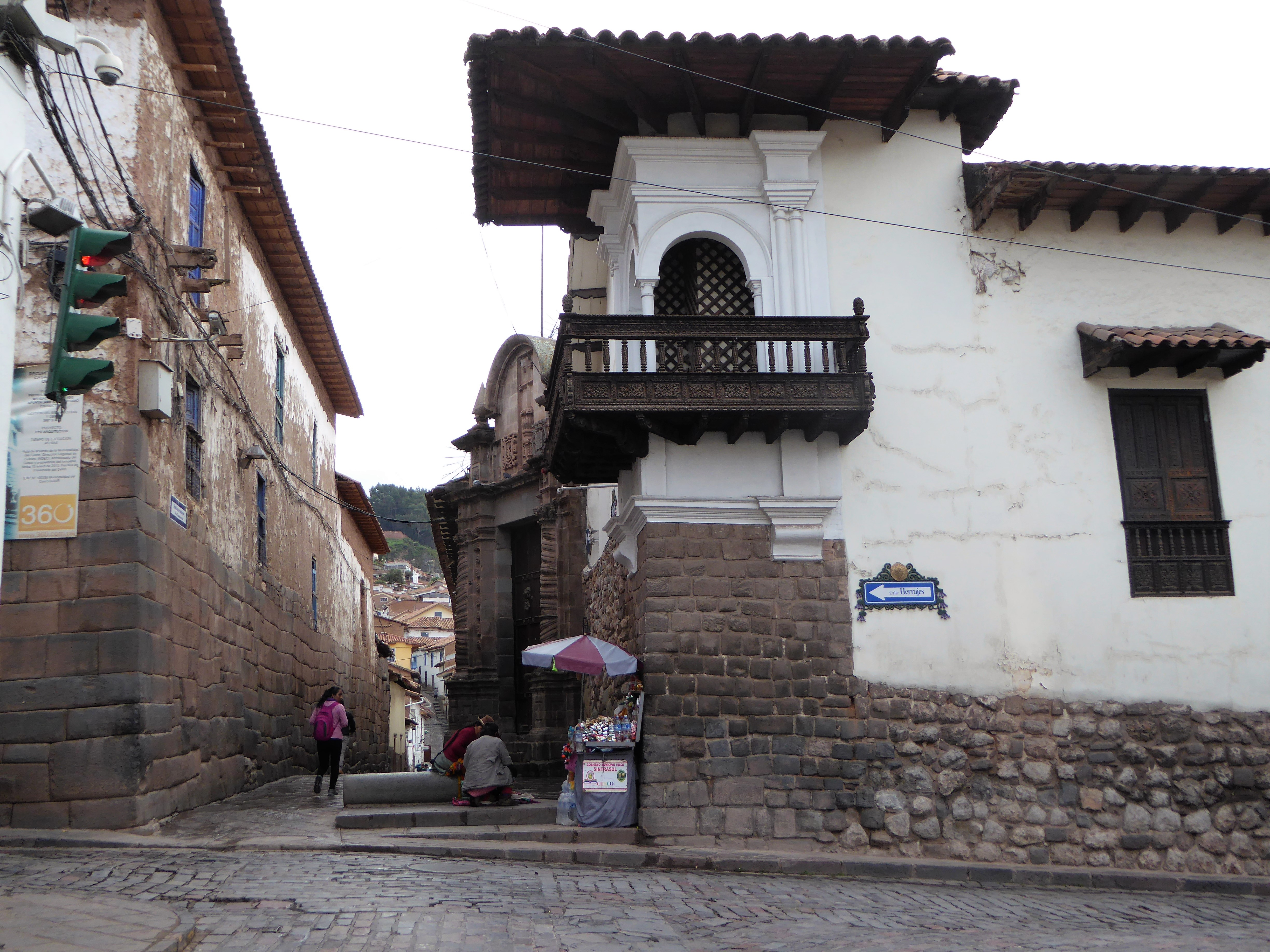 In der Altstadt von Cusco